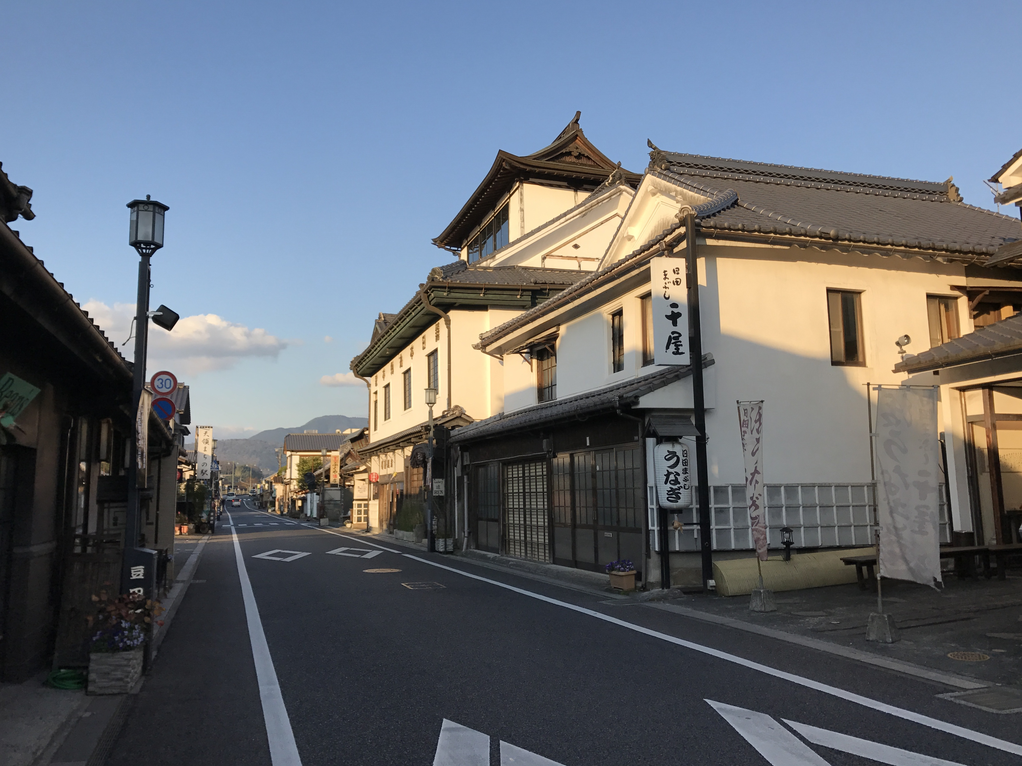 豆田町・日本丸館(岩尾薬舗)と上町通り